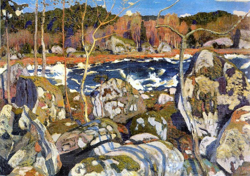 Рылов, Аркадий Александрович Весна в Финляндии. 1905 г.